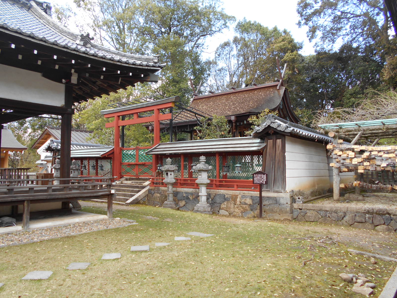 氷室神社の本殿